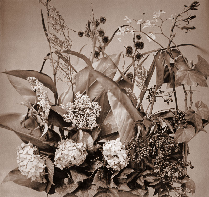 Pflanzenstudie